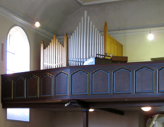 Orgelprospekt der Kirche St. Gangolf, Gemeinde Mettlach, Landkreis Merzig-Wadern, Saarland. Die Kirche wurde im Jahr 1775 errichtet.